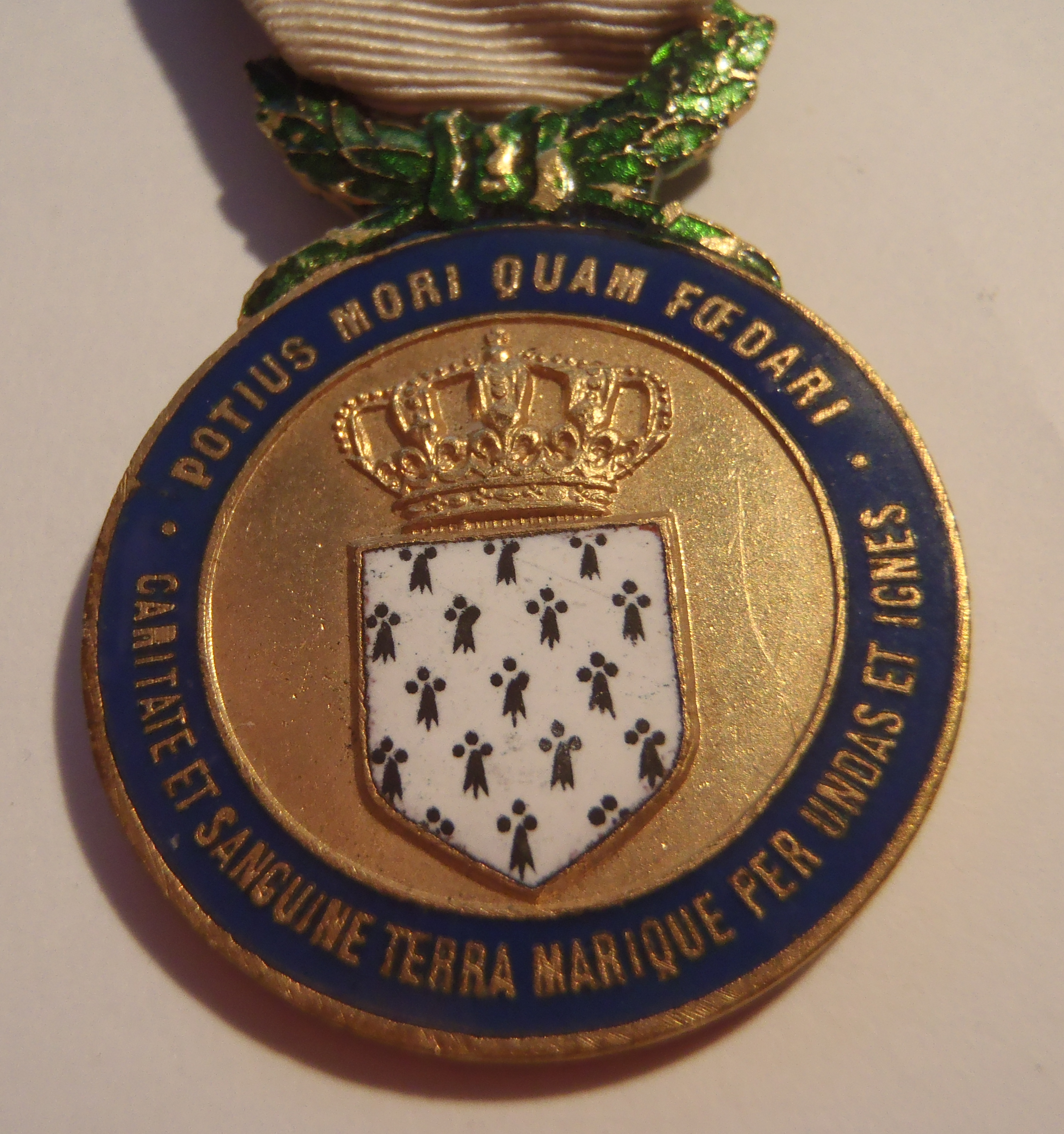 Médaille d'honneur des Hospitaliers Sauveteurs Bretons